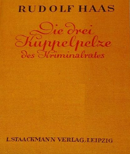 Rudolf Haas: Die drei Kuppelpelze des Kriminalrates. Roman, L. Staackmann Verlag, Leipzig 1926. Buchdeckel (Emblem aus urheberrechtlichen Erwägungen ausgeblendet). 302 Seiten